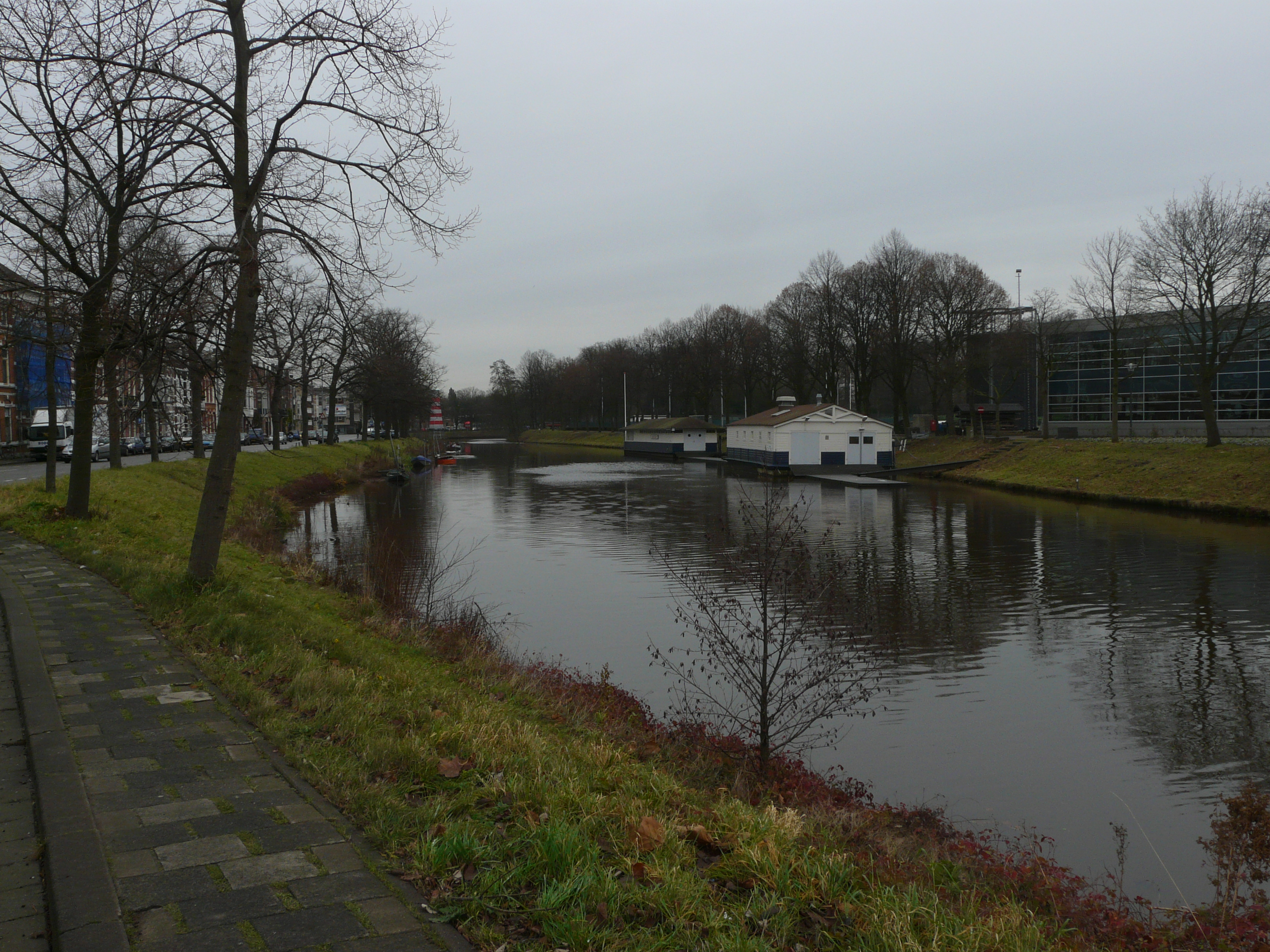 Zicht op een deel van de Academiesingel. Gelegen nabij het Station Breda en het Park Valkenberg. Niet ver van het centrum van Breda